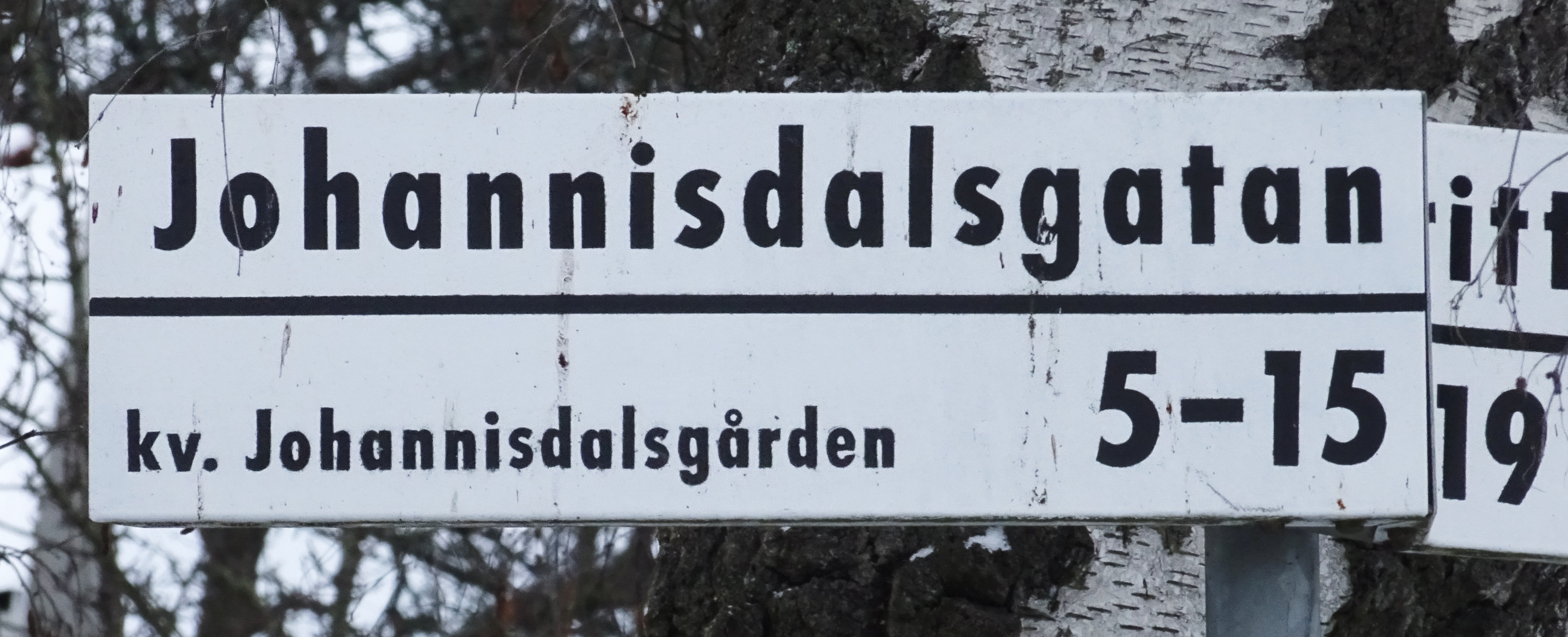 Kvarteret Johannisdalsgården, och Johannisdalsgatan, Mälarhöjden